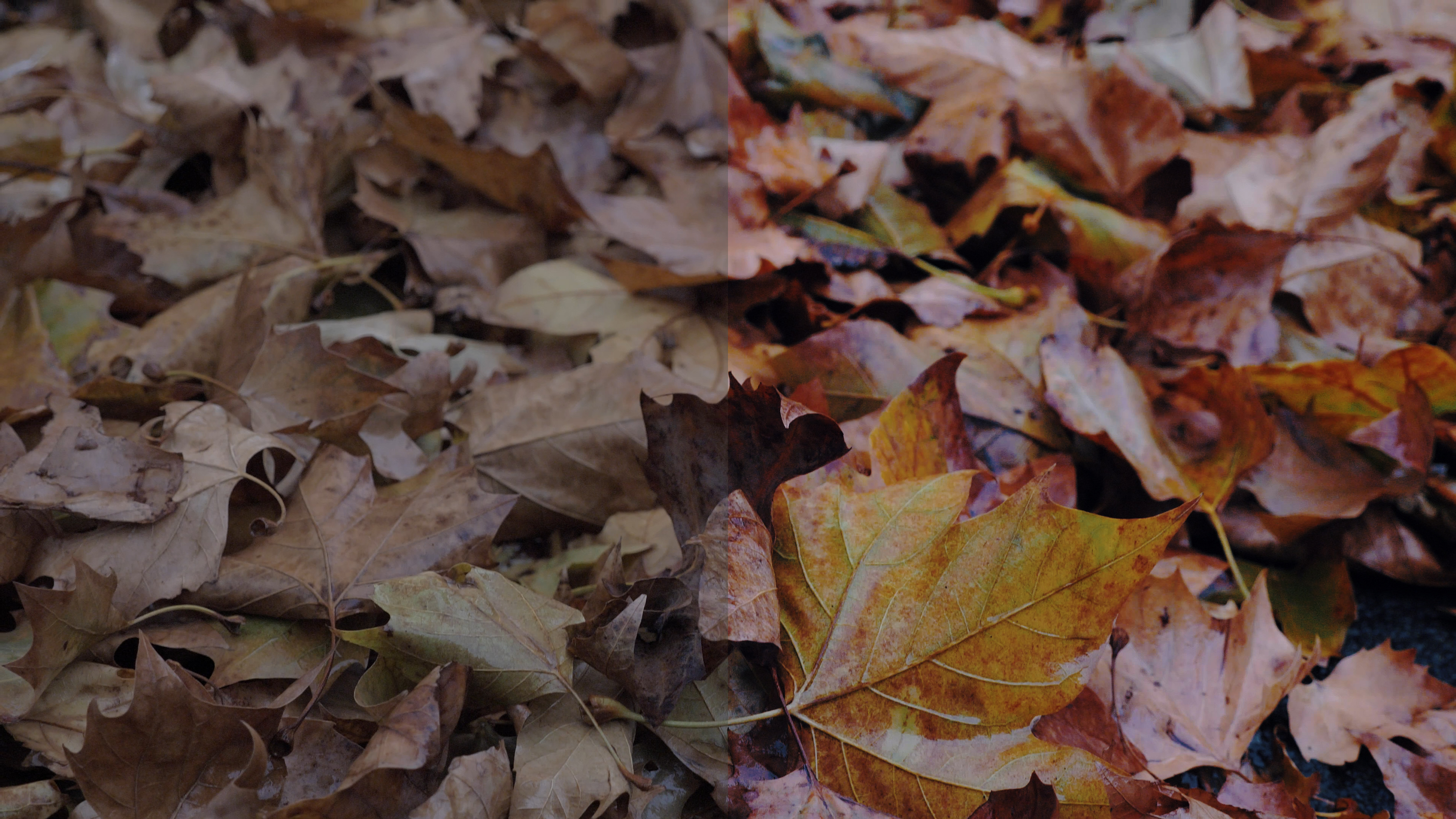 Comparación de un mismo fotograma sin y con aplicación de LUTs